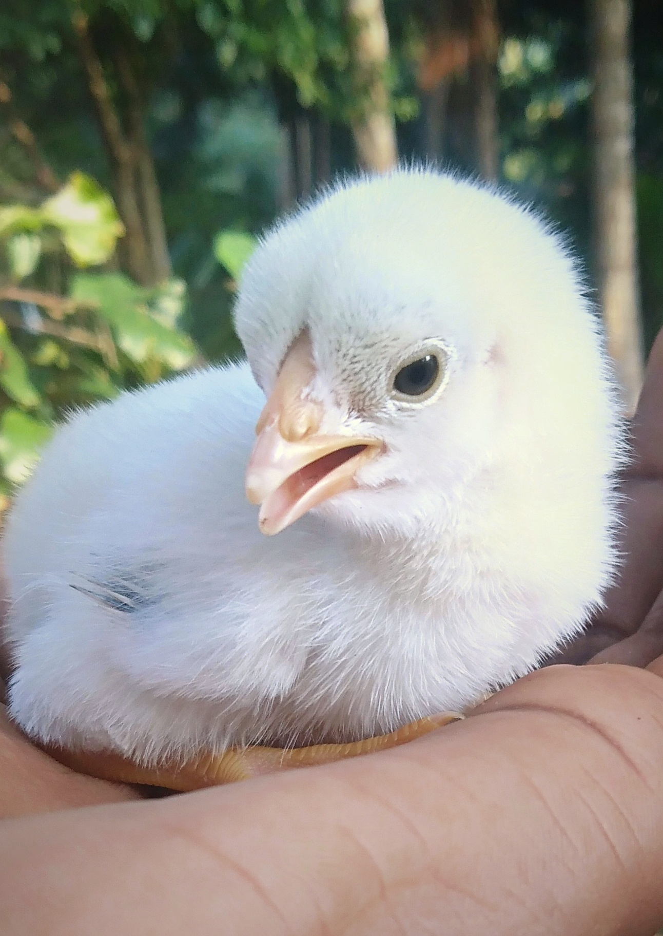 కోడి పిల్ల